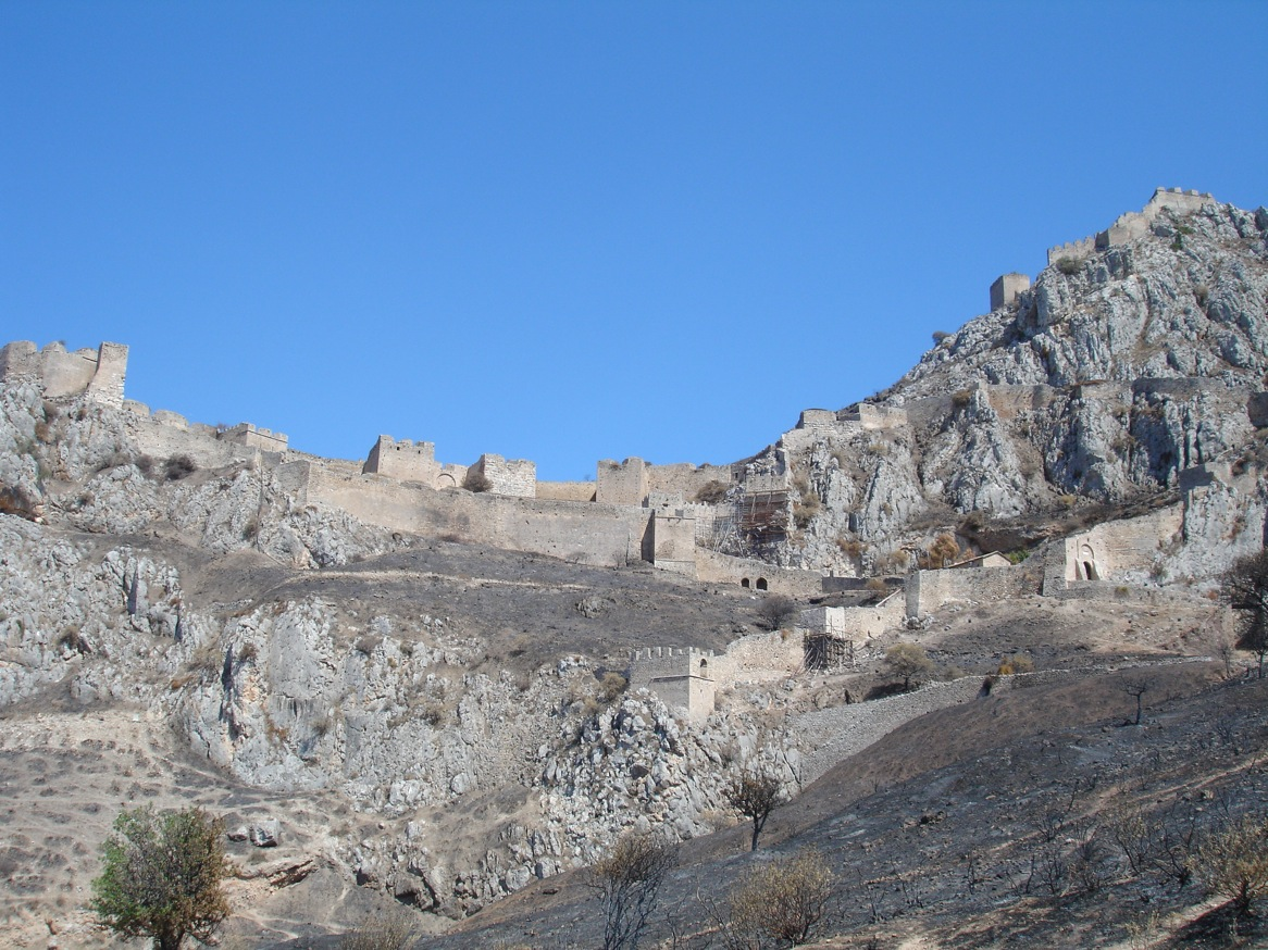 Panorámica del Acrocorinto